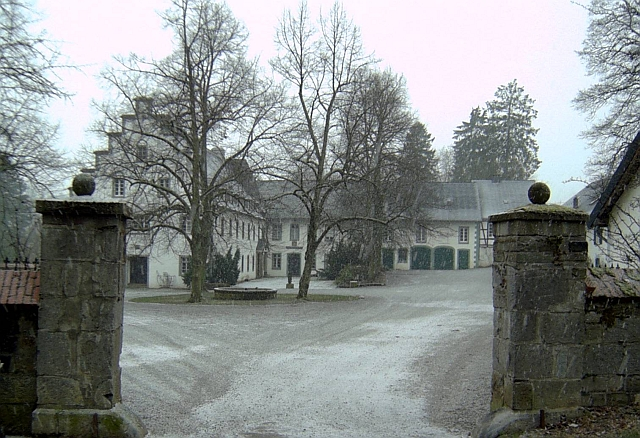 Gut Stockhausen in Meschede , Germany.